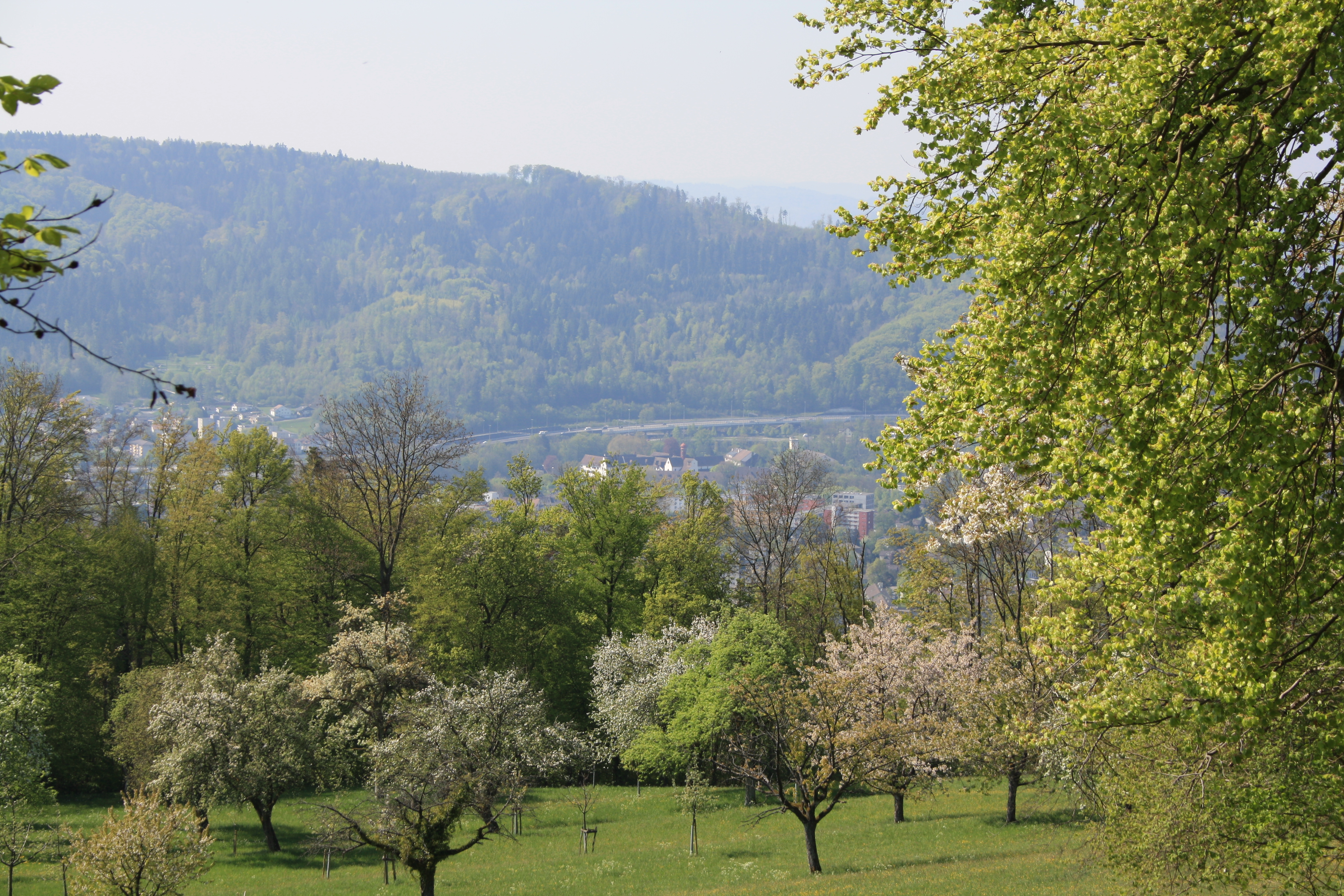 Blick vom Bussberg Richtung Baregg und Kloster Wettingen